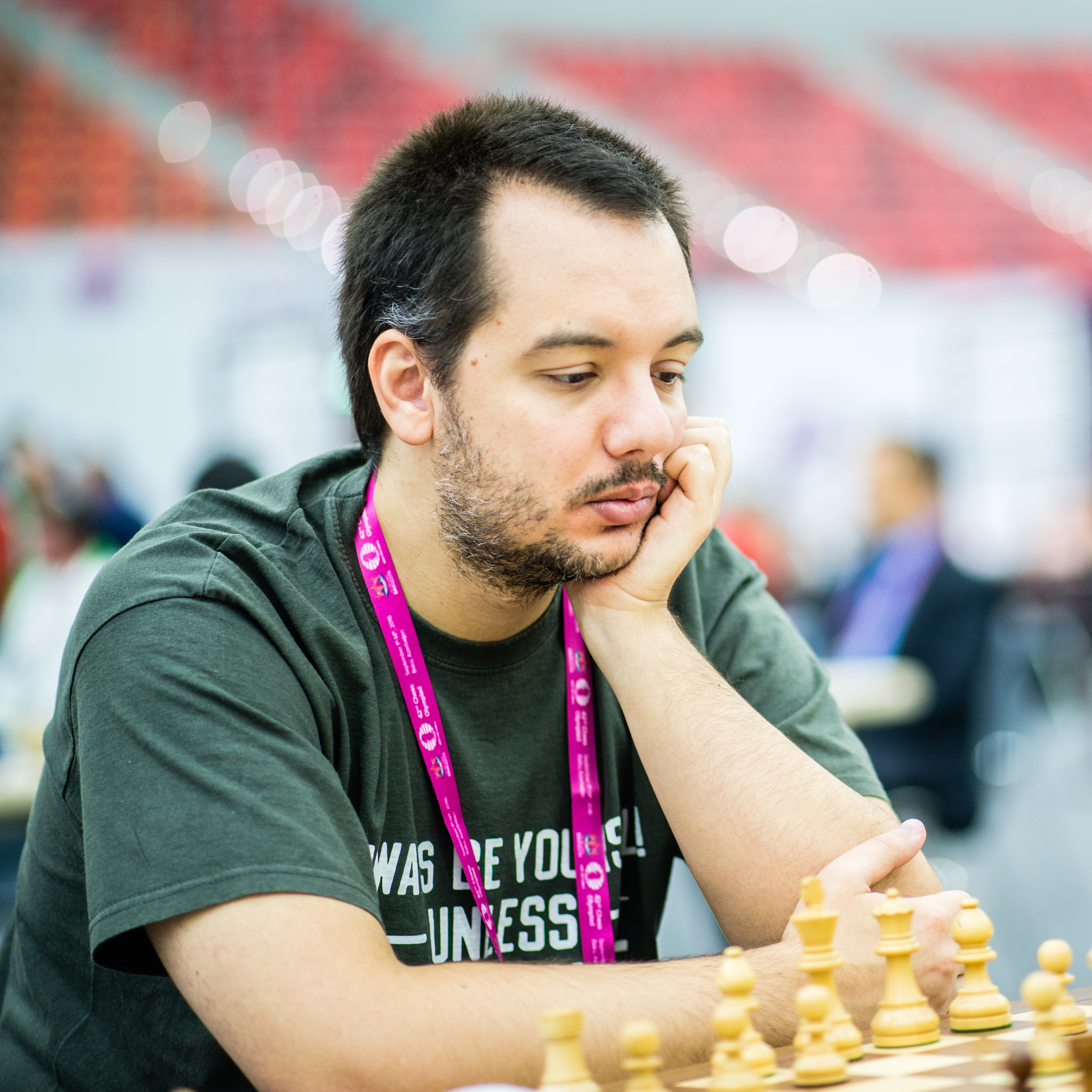 Mastrovasilis Dimitrios-2